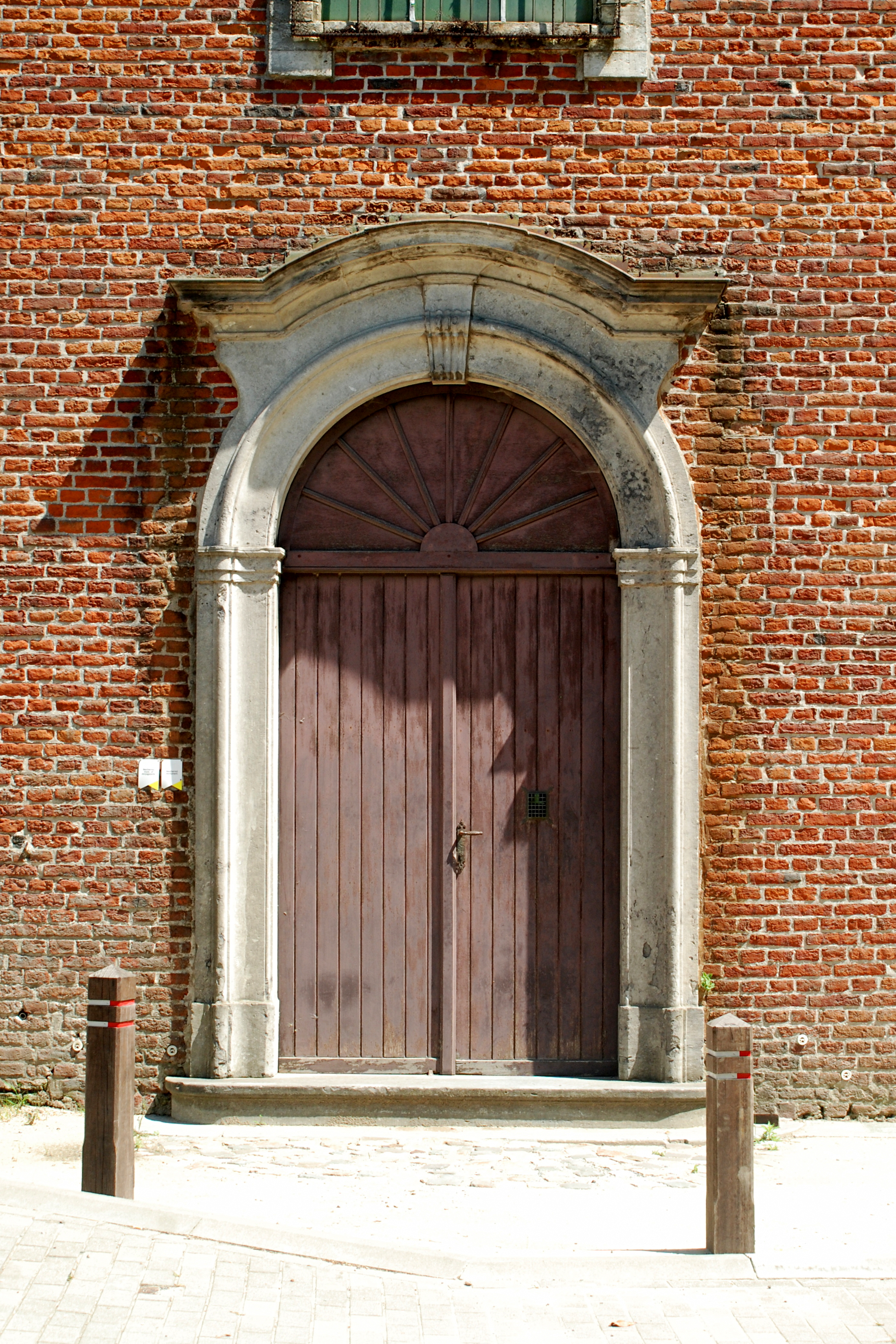 Belgique - Brabant flamand - Huldenberg - Neerijse - Chapelle Notre-Dame ten Pui